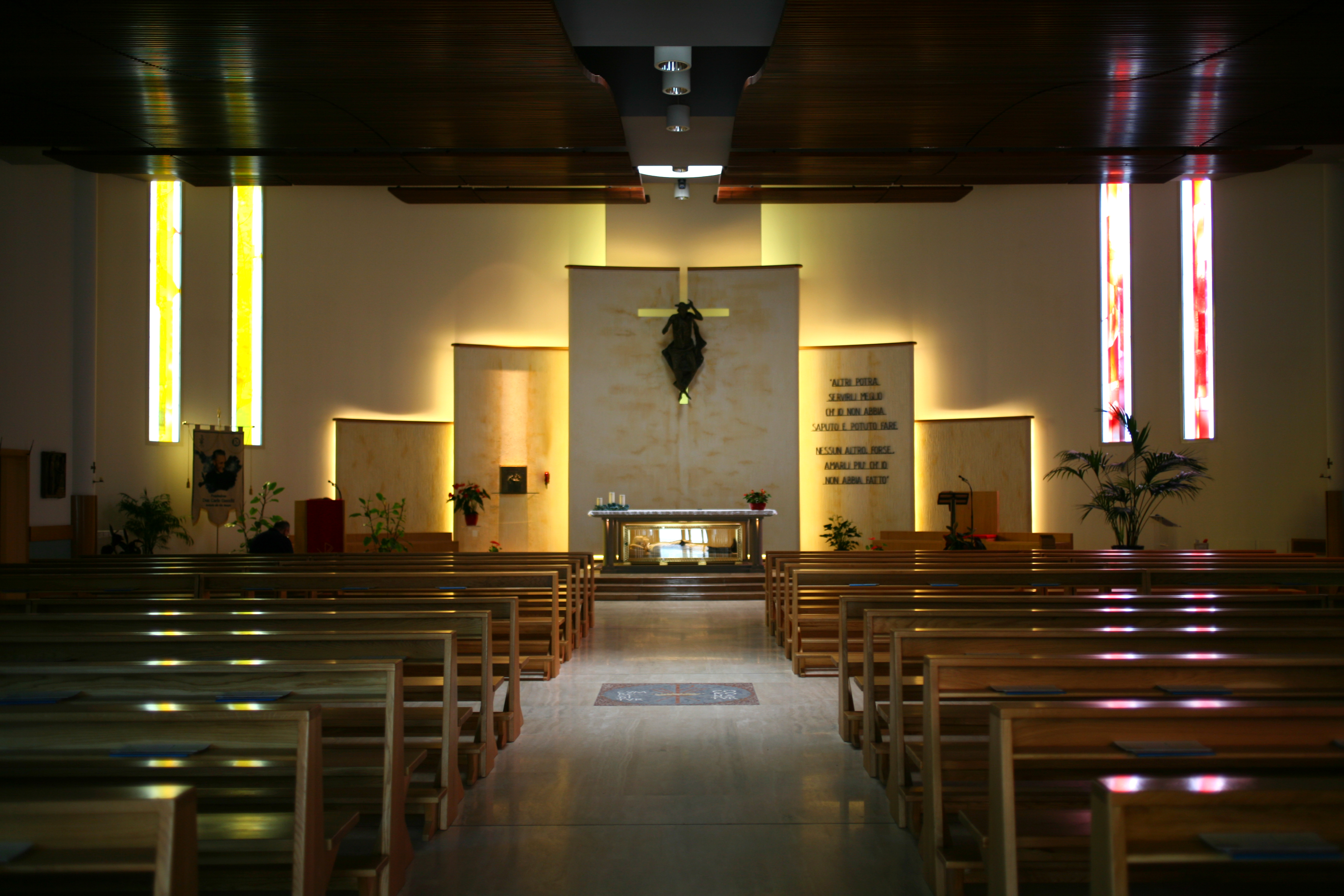 Interno del Santuario diocesano del beato don Gnocchi